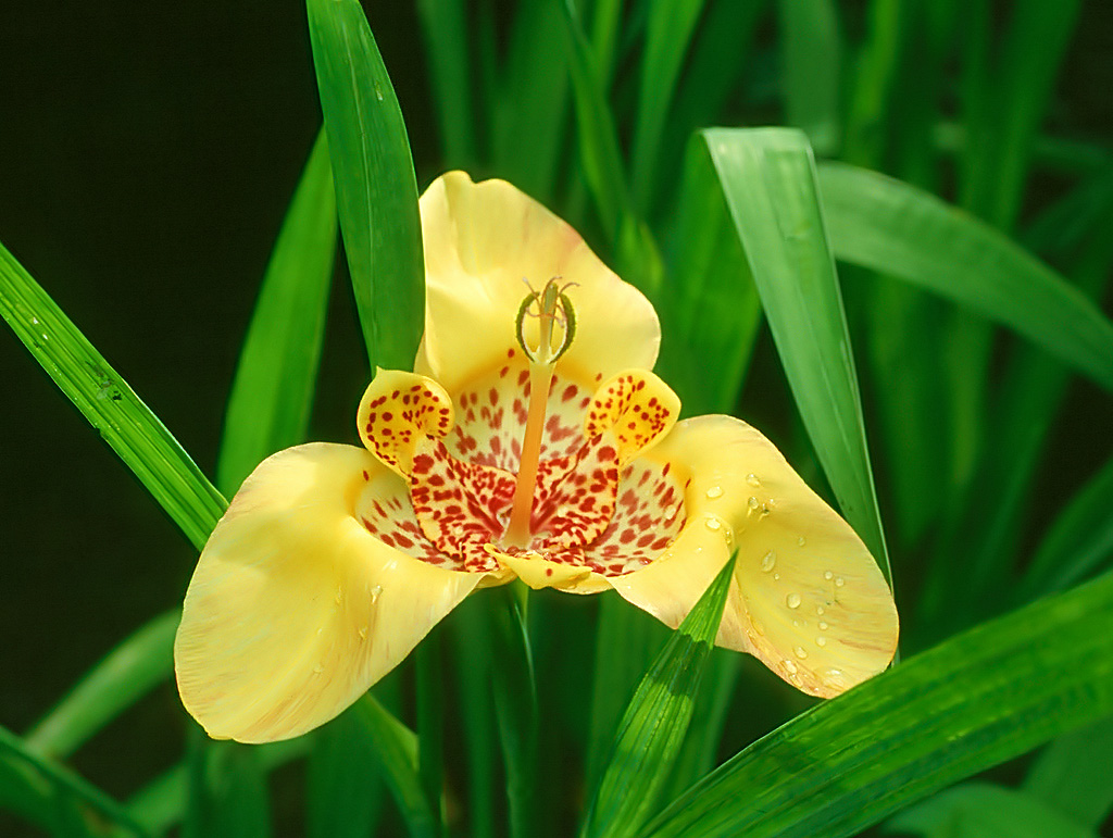 Pfauenblume (Tigerblume, Tigridia Pavonia) Schwertliliengewächs aus der Gattung Tigerblume in Mittelamerika